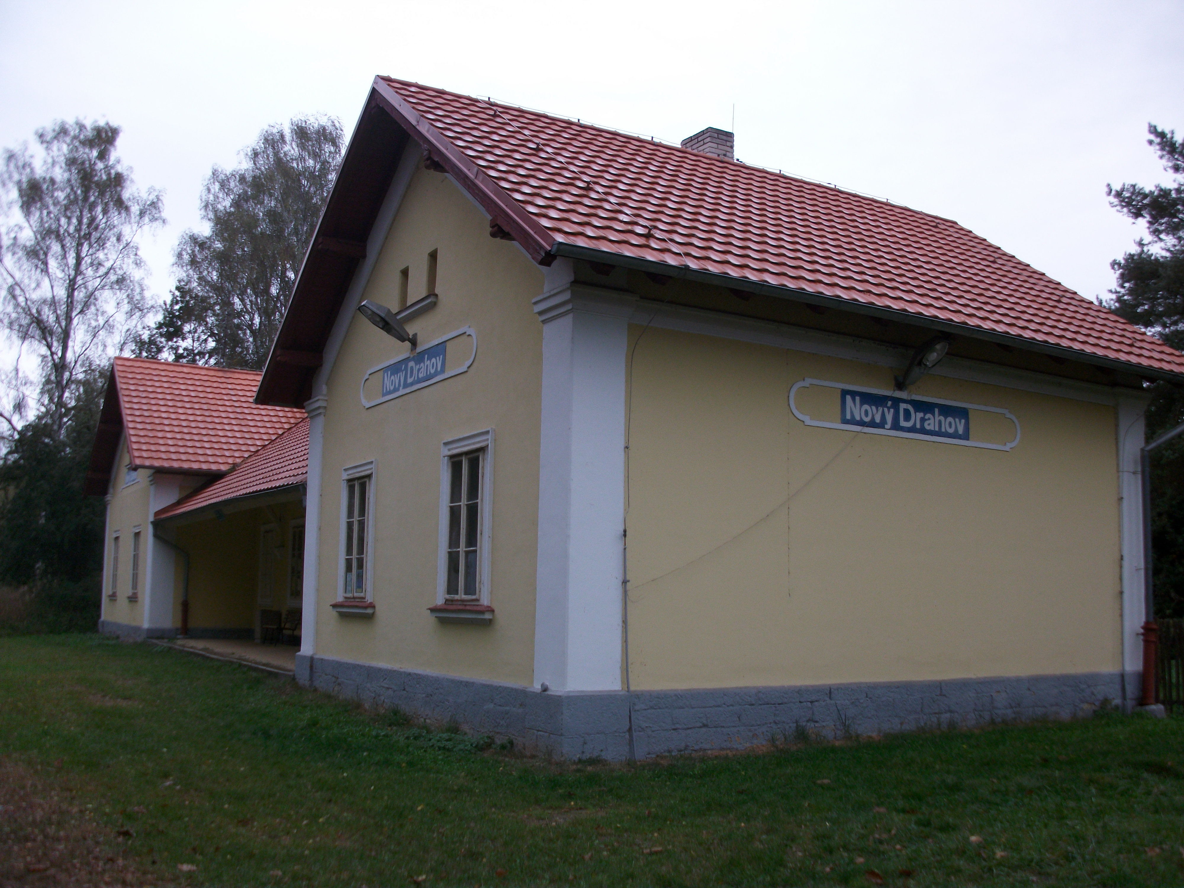 Haltepunkt Nový Drahov, Gleisseite (2016)